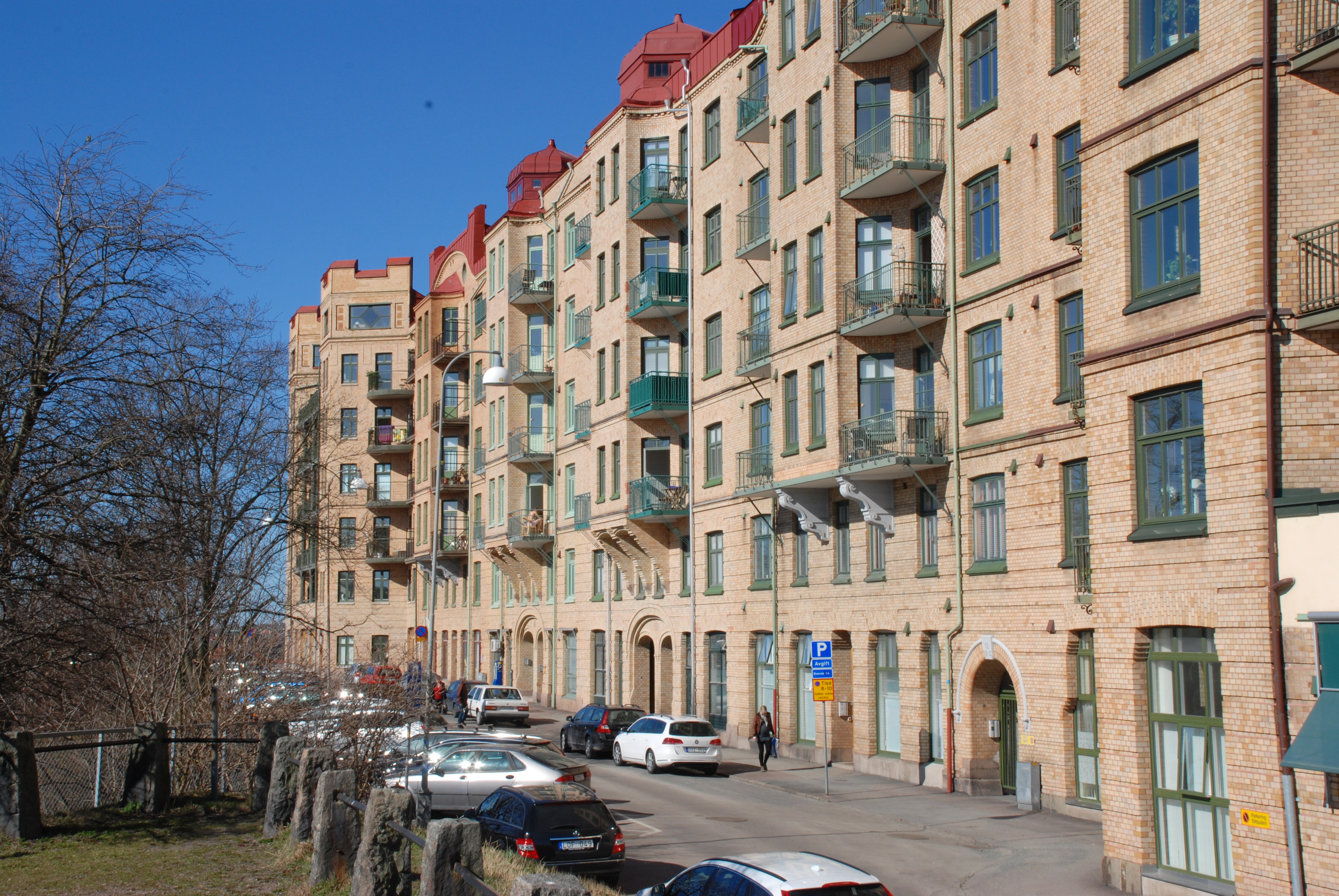 Arsenalsgatan på Kungshöjd i Göteborg.